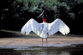 (também conhecido como Tuiuiú)